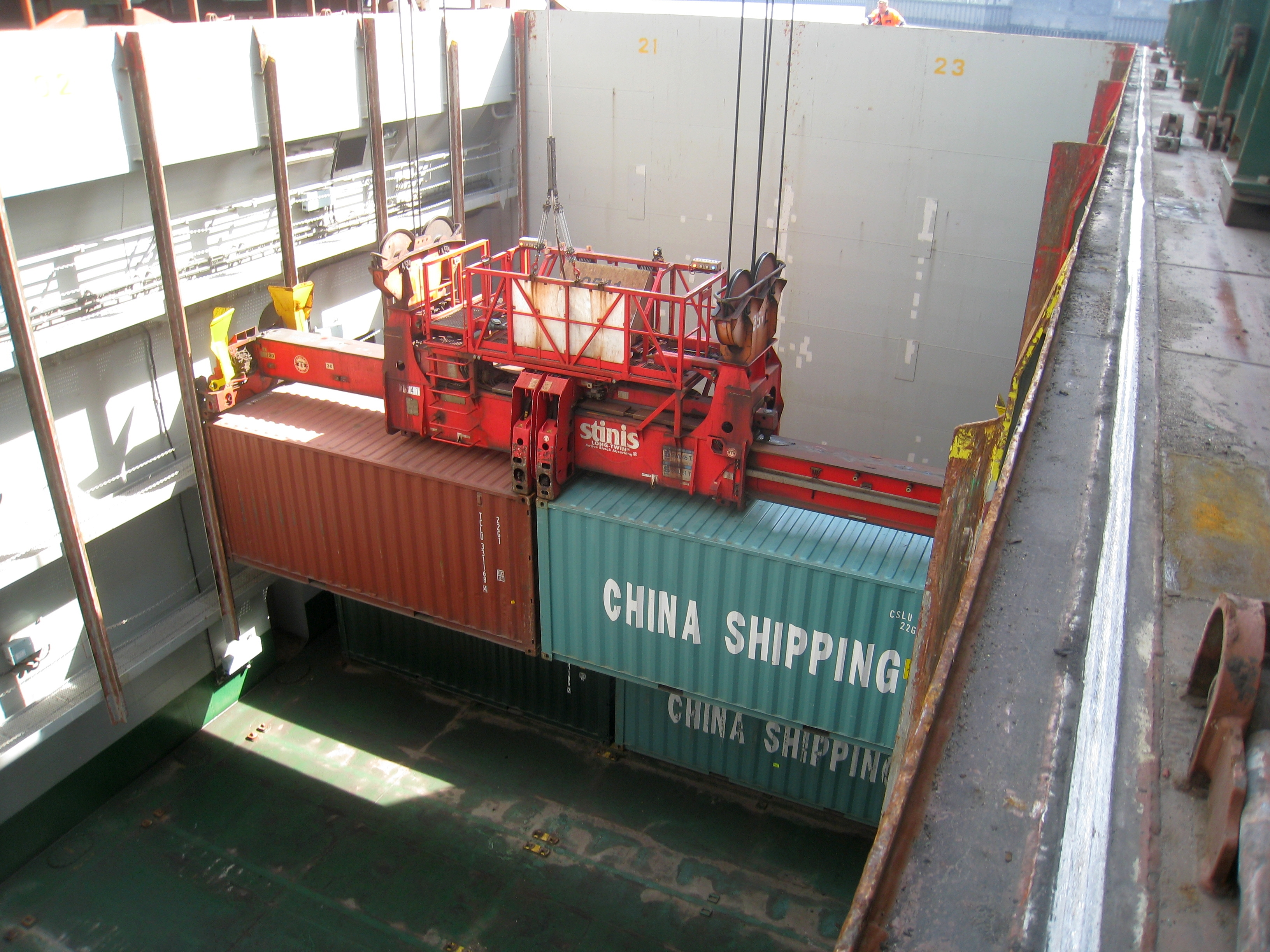 KATHARINA SCHEPERS-Beladung mit Containern